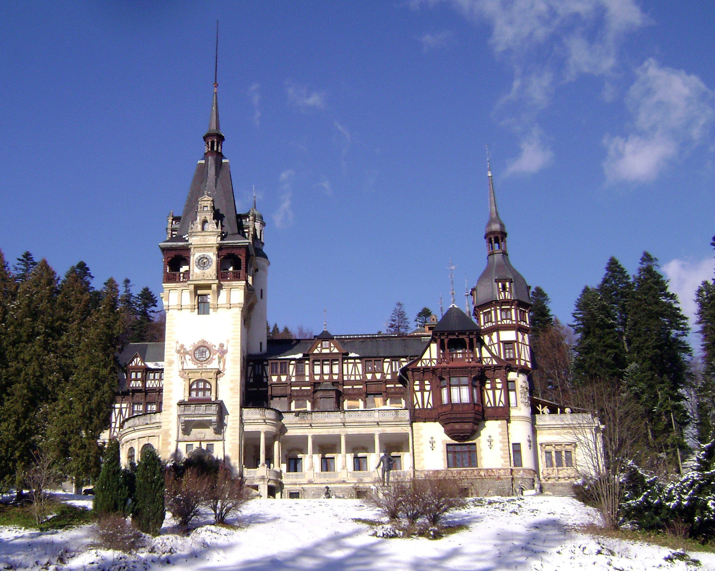 Peleş, Sinaia, Romania. Winter 2007 01